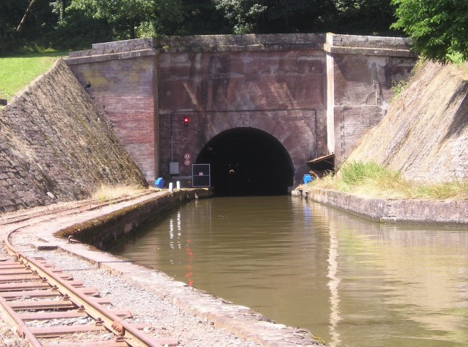 Tunnel am Rhein-Marne-Kanal bei Arzviller